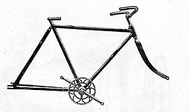 Polkupyörän runko